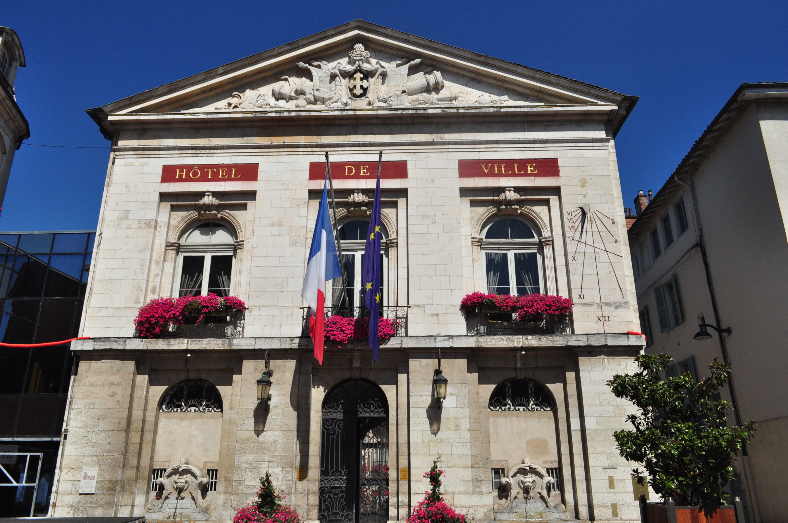 Ayuntamiento (Hôtel de ville) de la ciudad de Bourg-en-Bresse, en la región del Ródano-Alpes.